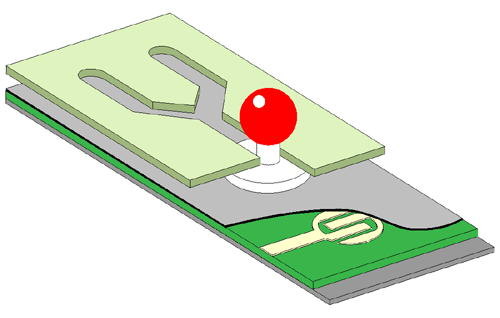 Technischer Aufbau Grafischer Programmierer